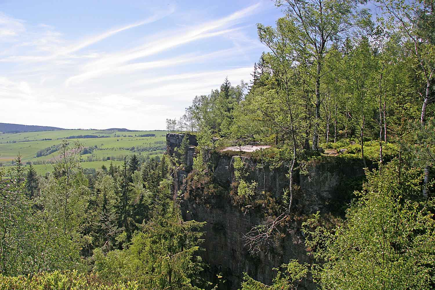 Vyhlídka Skaly Puchacza ve Stolových horách v Polsku, autor: Zp